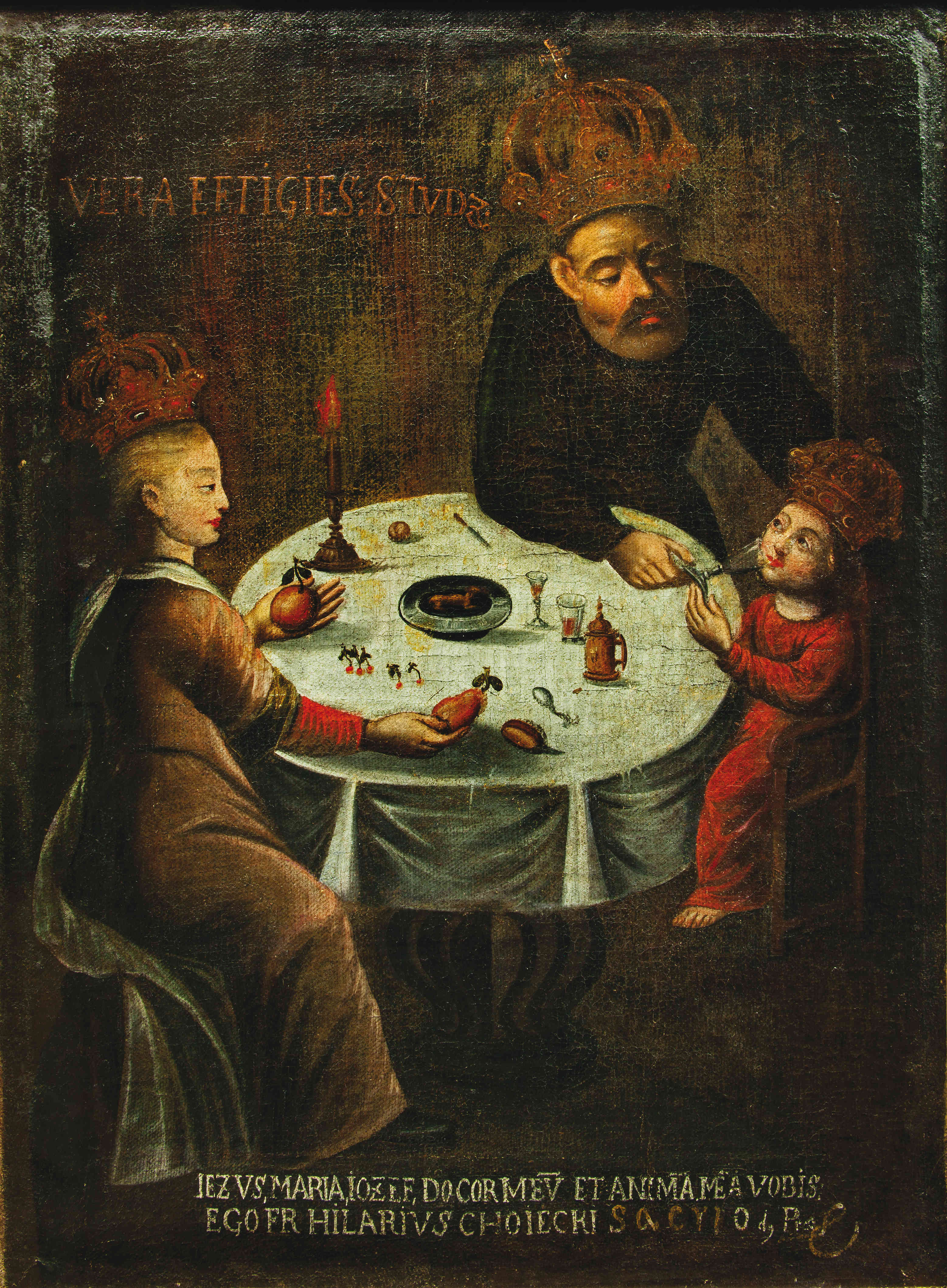 Музей: Гродзенскі дзяржаўны музей гісторыі рэлігіі Від: жывапіс Прадметнае імя: абраз Назва/аўтарская назва: Святая сям'я Матэрыял: палатно; Тэхналогія стварэння: жывапіс алейны; Месца стварэння: Беларусь, Гродна